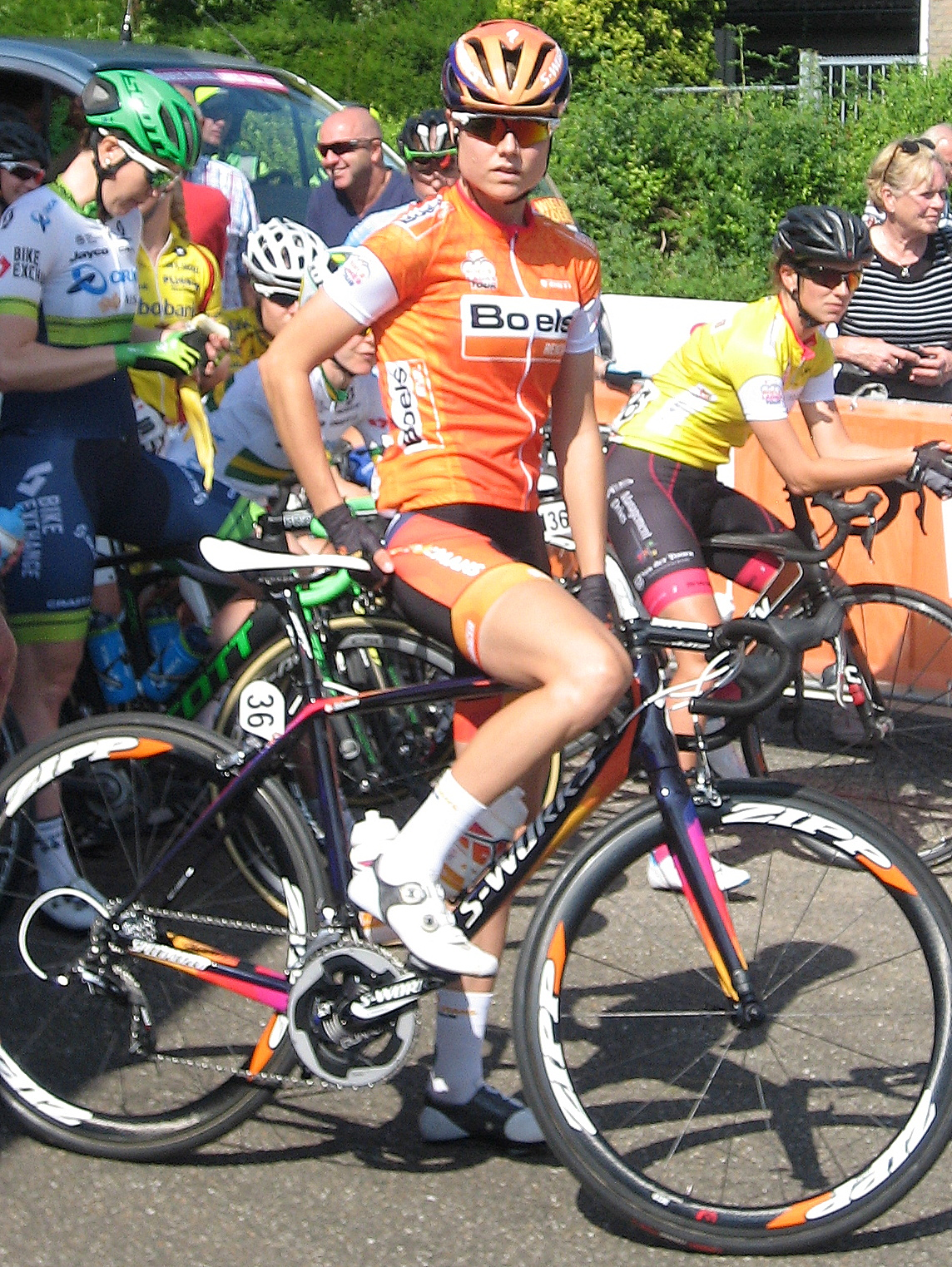 Amalie Dideriksen (Boels Dolmans) in leiderstrui voor start 3e etappe Holland Ladies Tour 2016